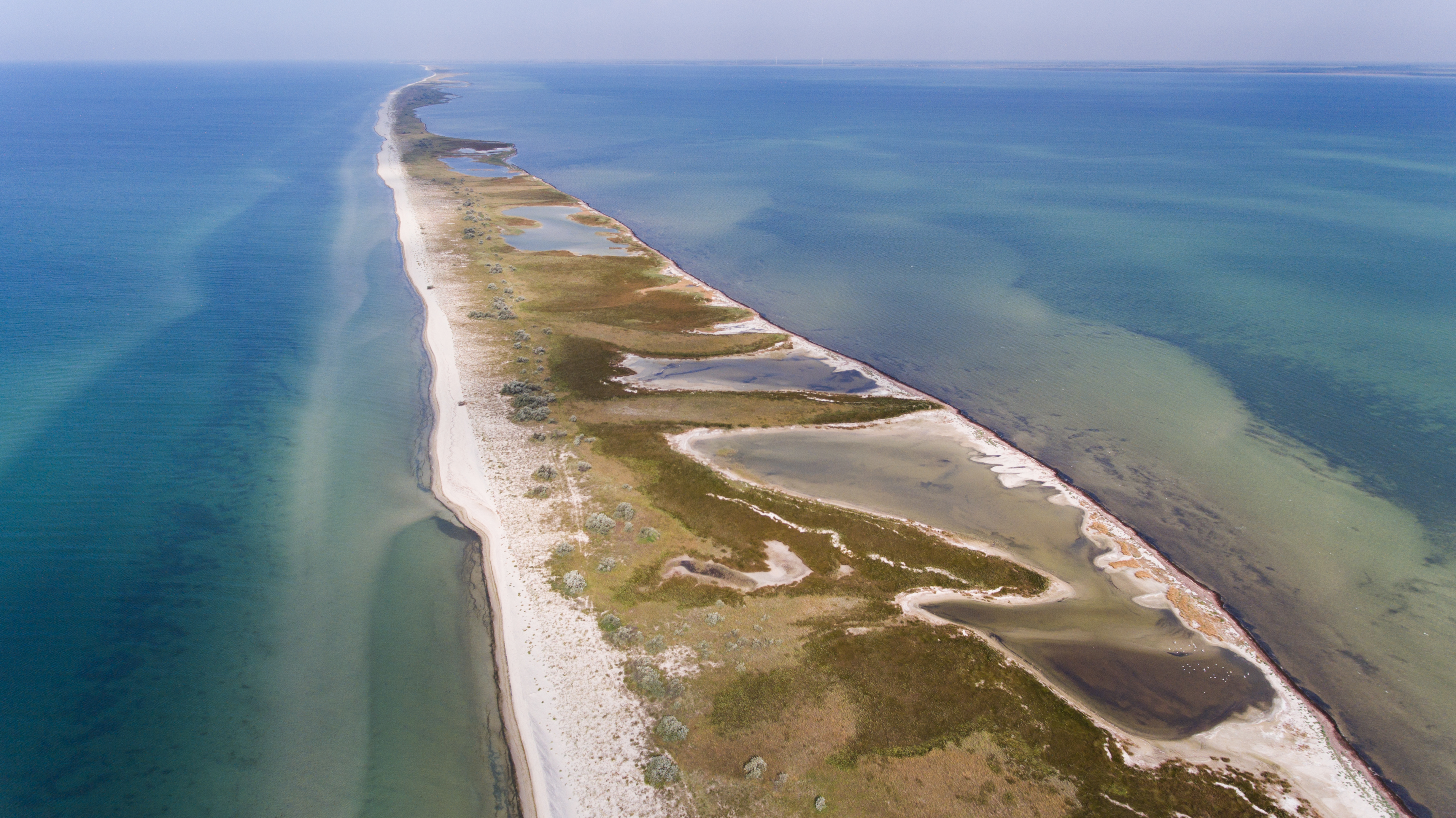 Джарилгацький, Скадовський район, Адміністрація створюється